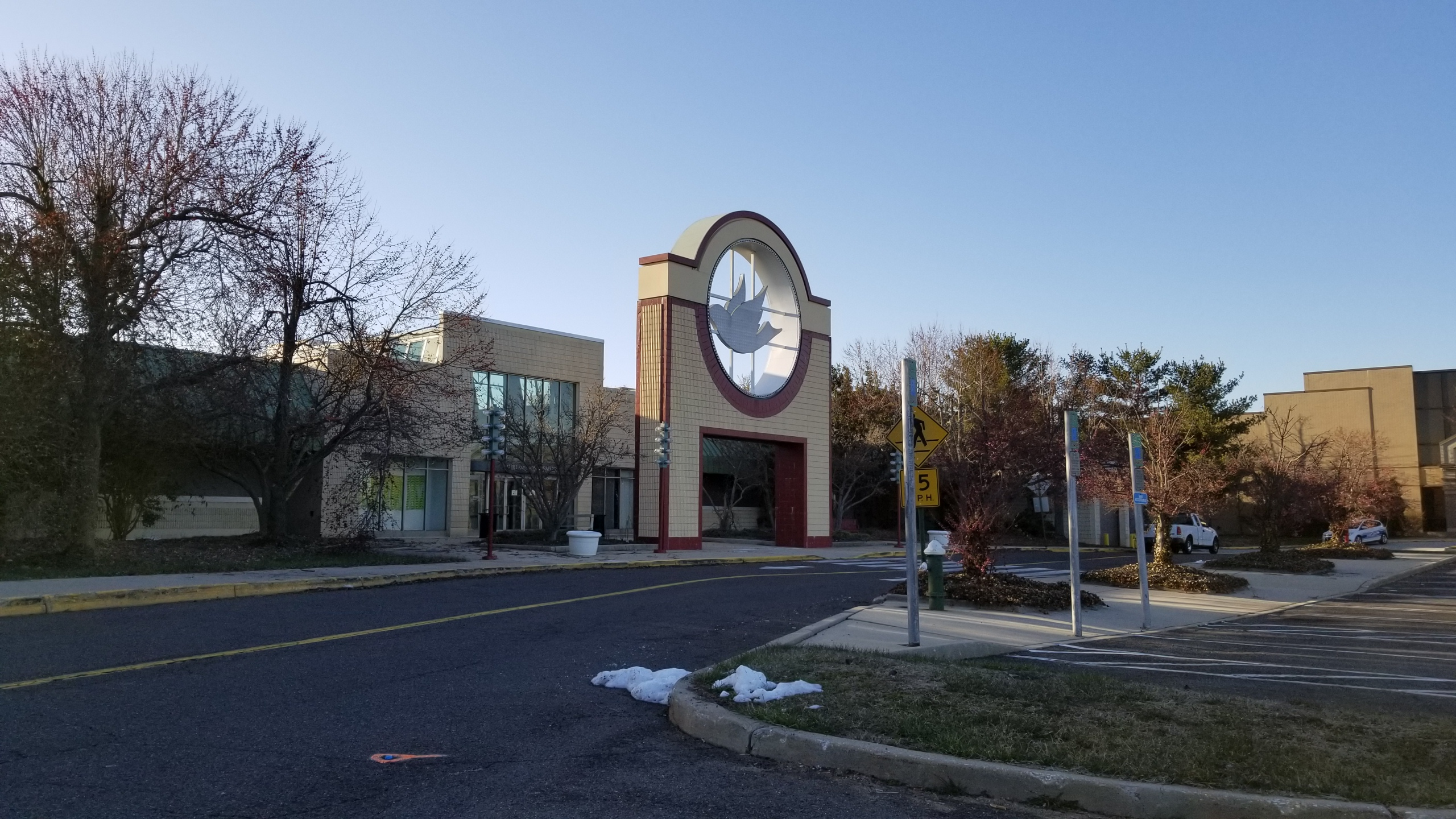 Burlington Center Mall Burlington, NJ March 2018